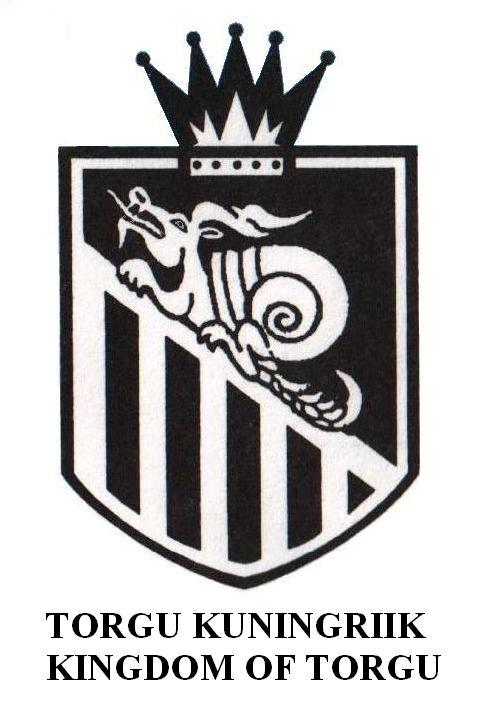 Torgu Kuningriigi vapp